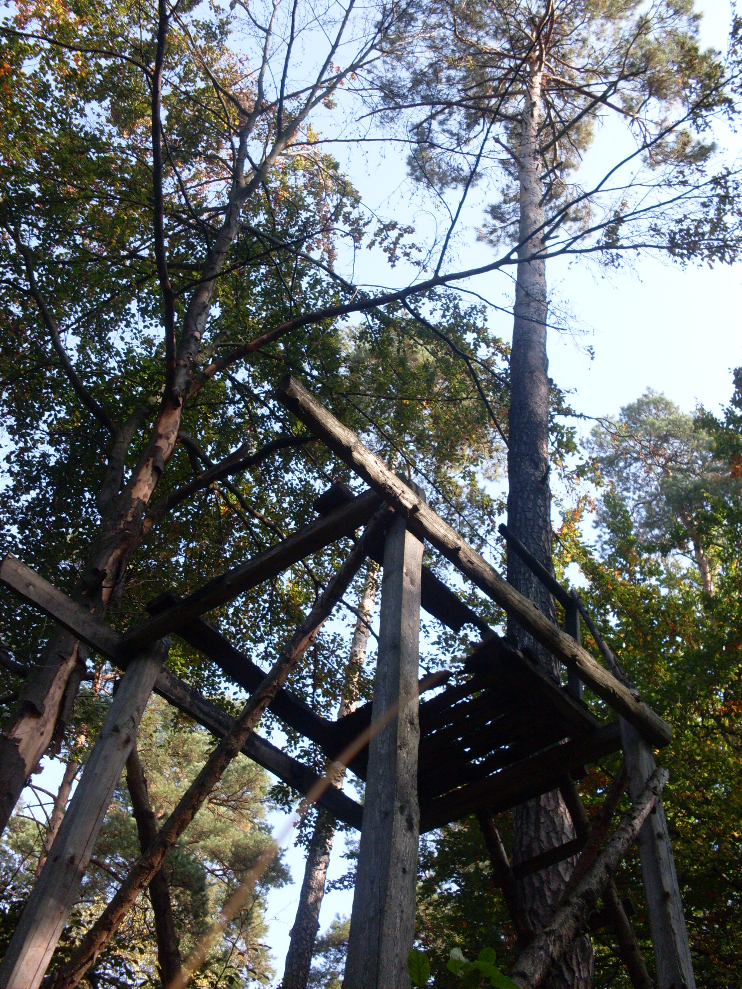 Spalona ambona leśna w Lesie Zwierzyniec (Garb Tenczyński)